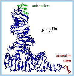 tRNA molekul